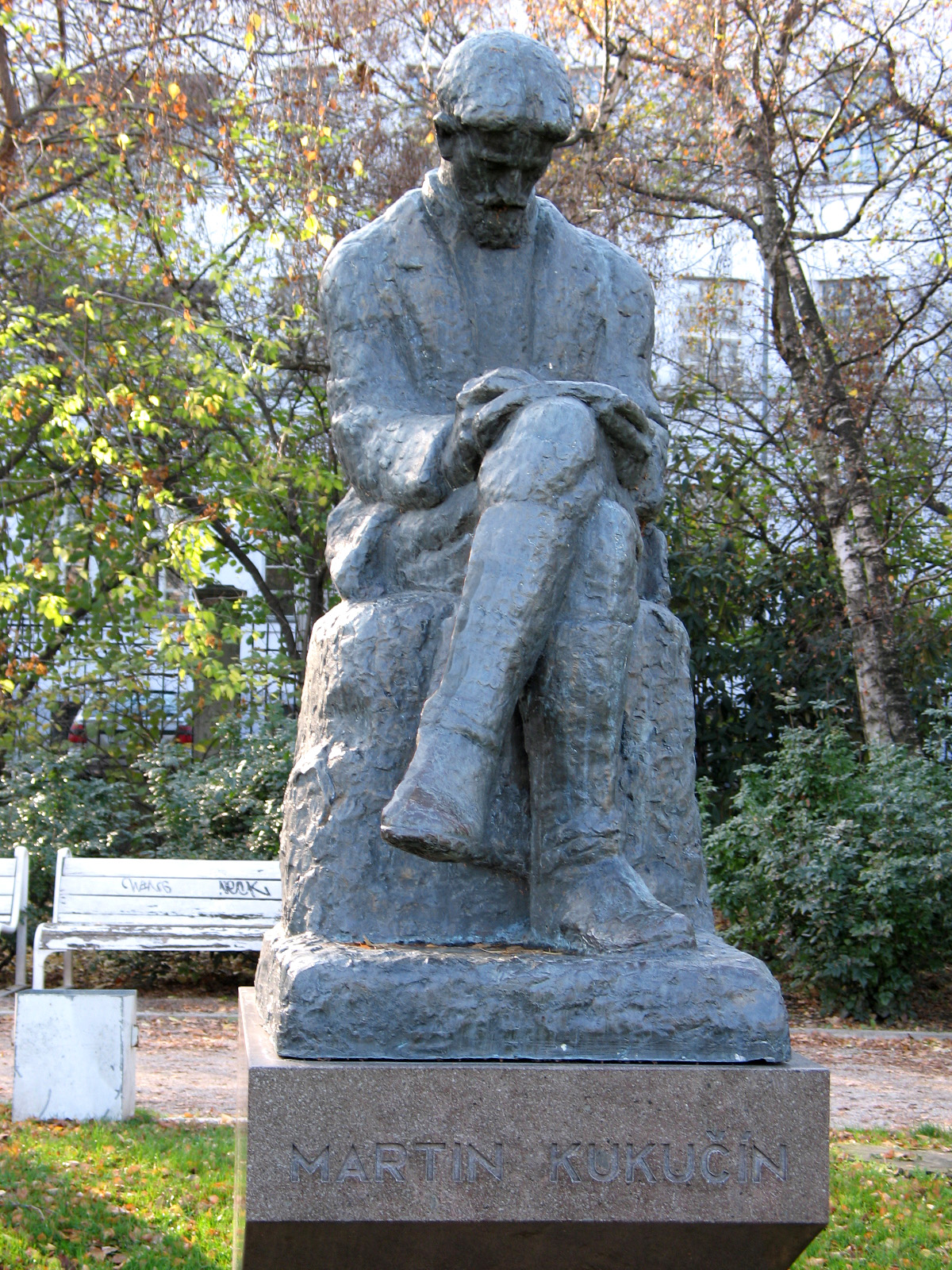 Bronzová plastika Martina Kukučína (1860 - 1928) v Medickej záhrade v Bratislave, je dielom významného chorvátskeho sochára Ivana Meštoviča